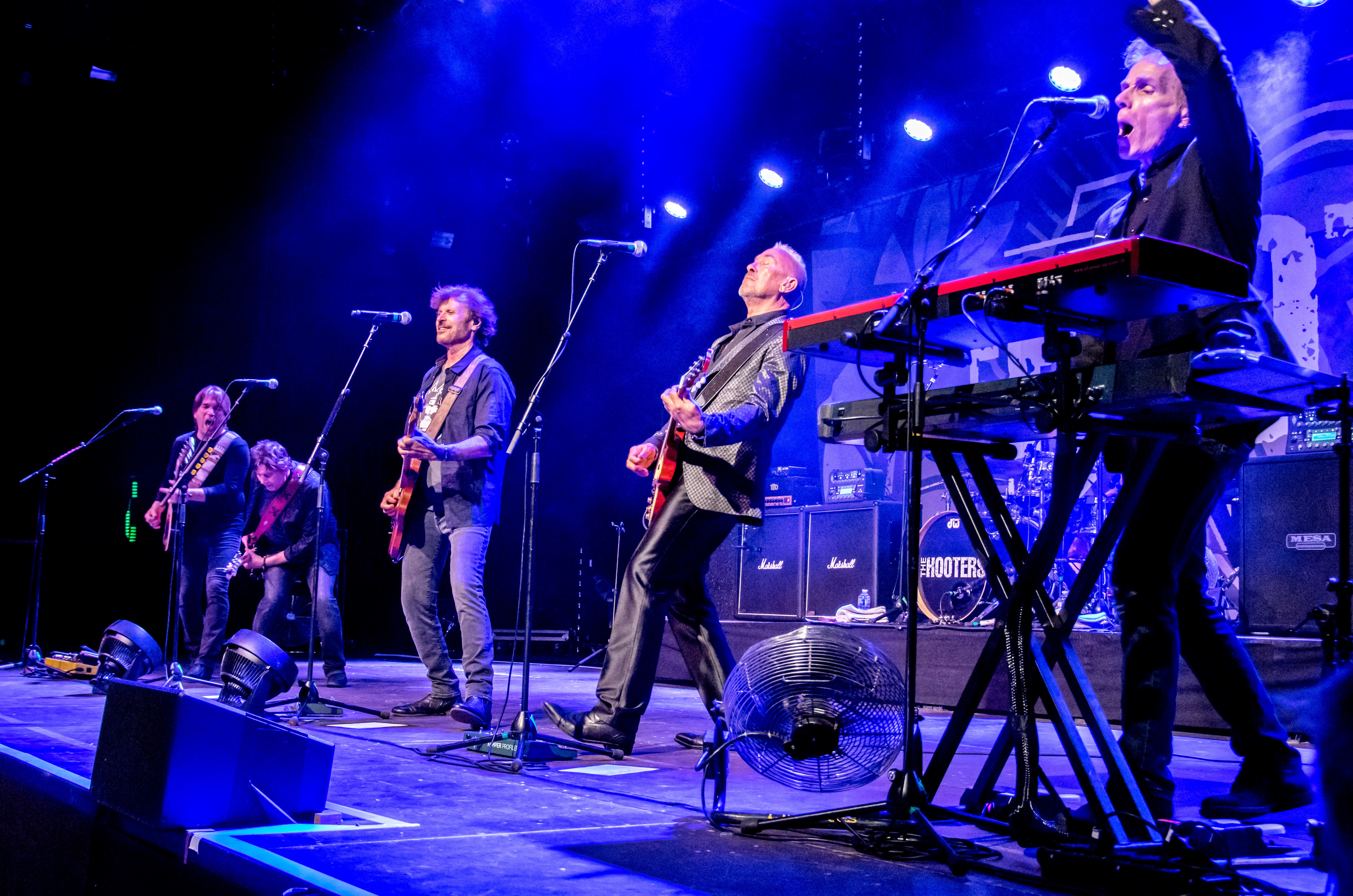 Bilder vom Zelt Musik Festival 2018 in Freiburg im Breisgau Auftritt The Hooters am 26. Juli 2018 im Zirkuszelt